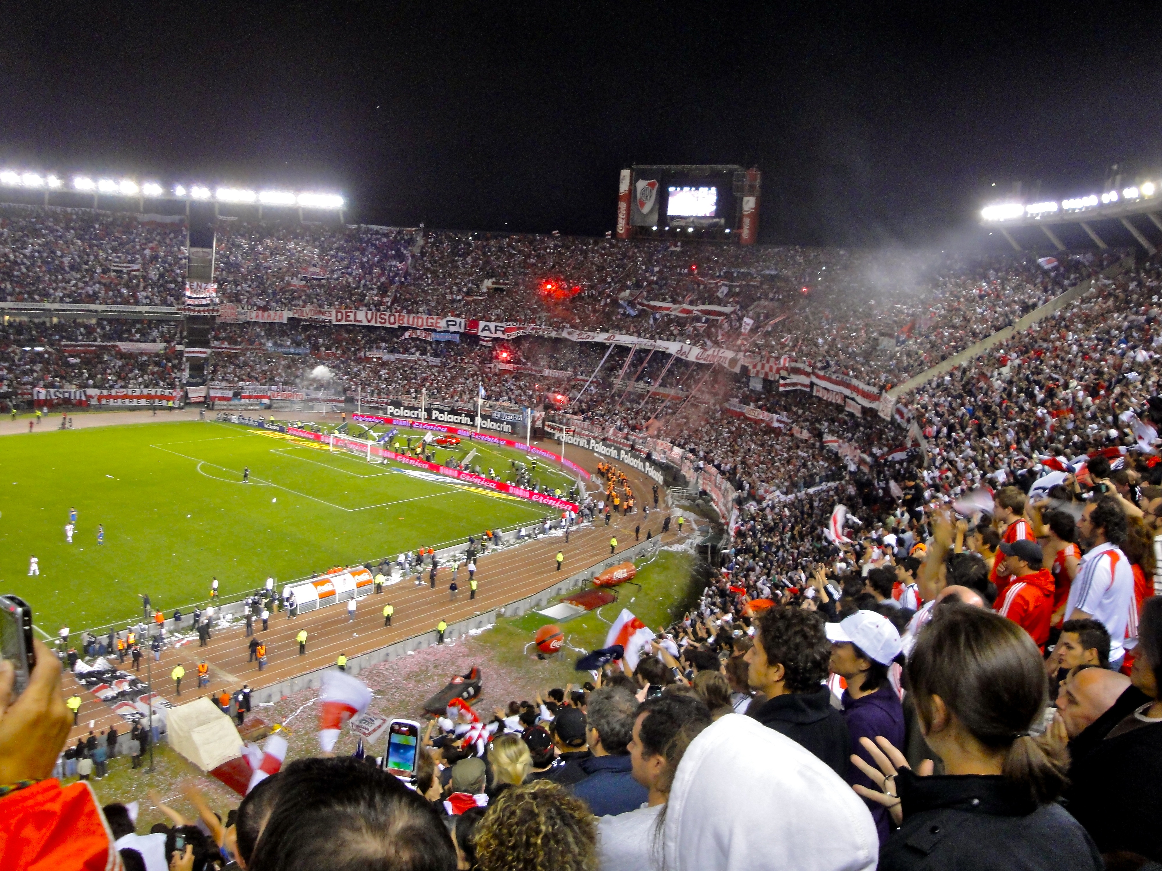 River Plate vs Boca Juniors - Estadio Monumental